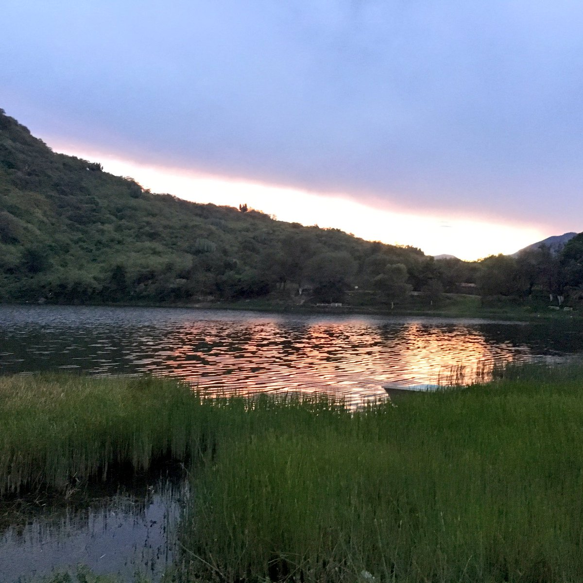 Laguna